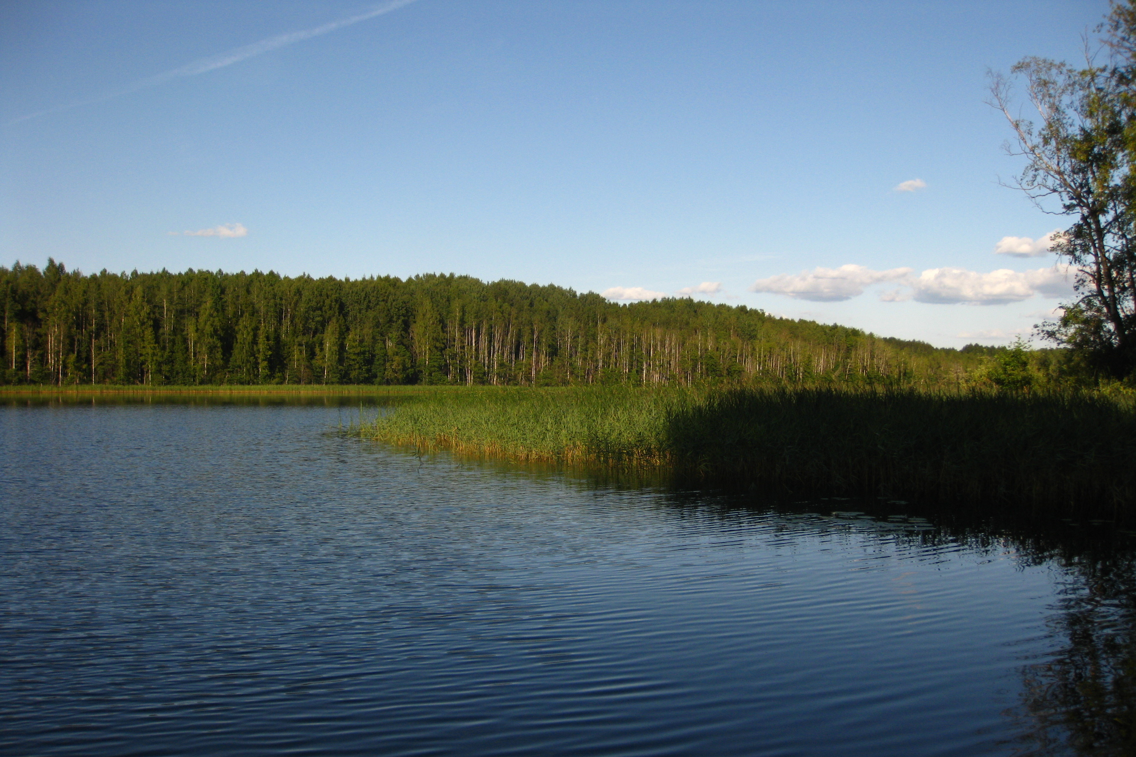 Tündre järve lõunakaldal, Tündre lka